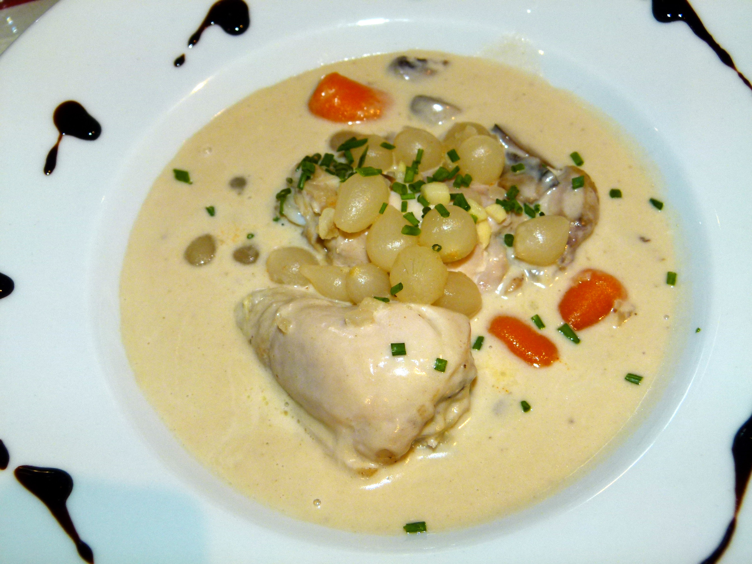 Coq au Riesling, Hahn in Riesling-Soße, Restaurant La Cave du Bailli, Bergheim, Elsass